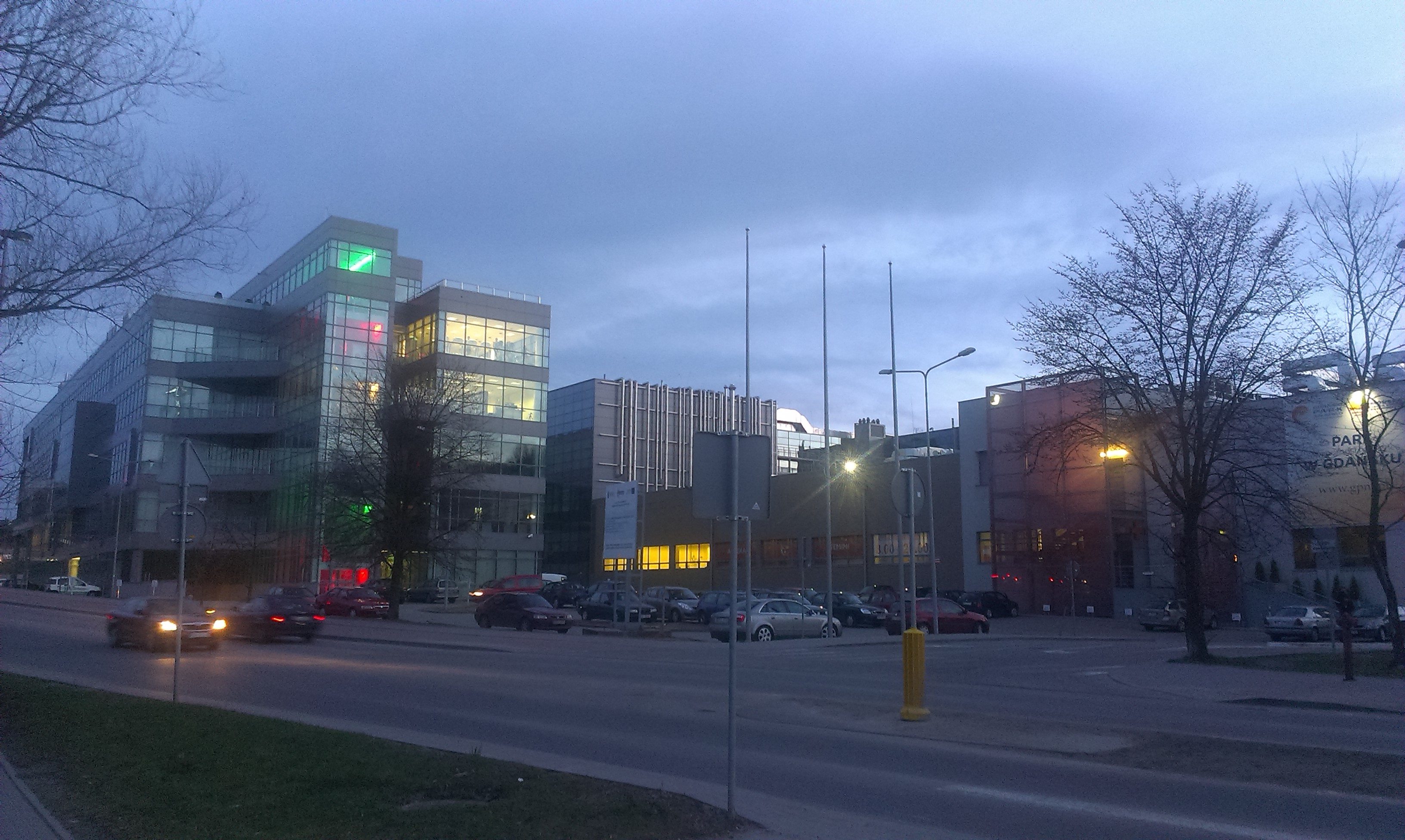 Gdański Park Naukowo-Technologiczny od strony ulicy Trzy Lipy.